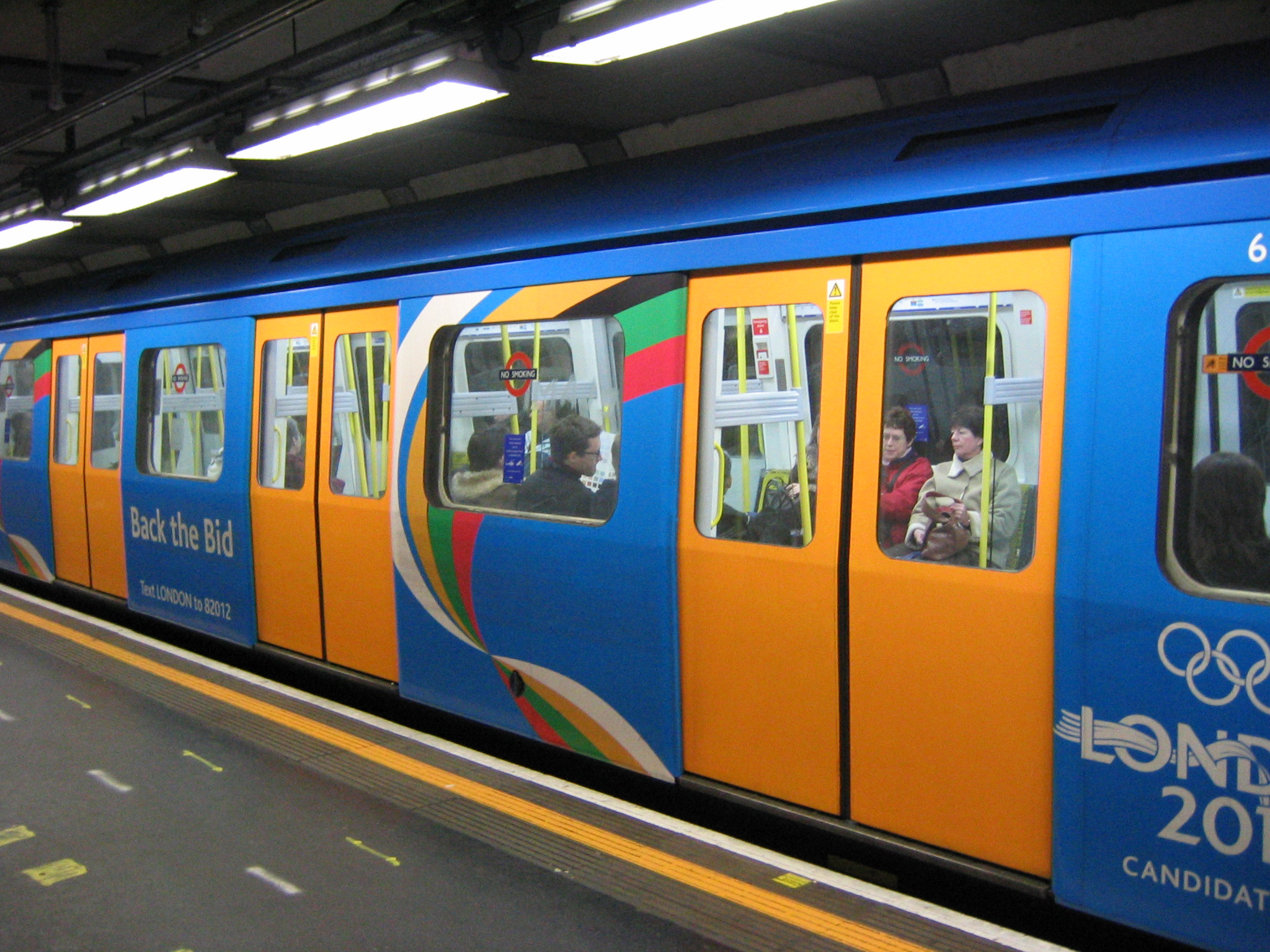 By ed g2s • talk.